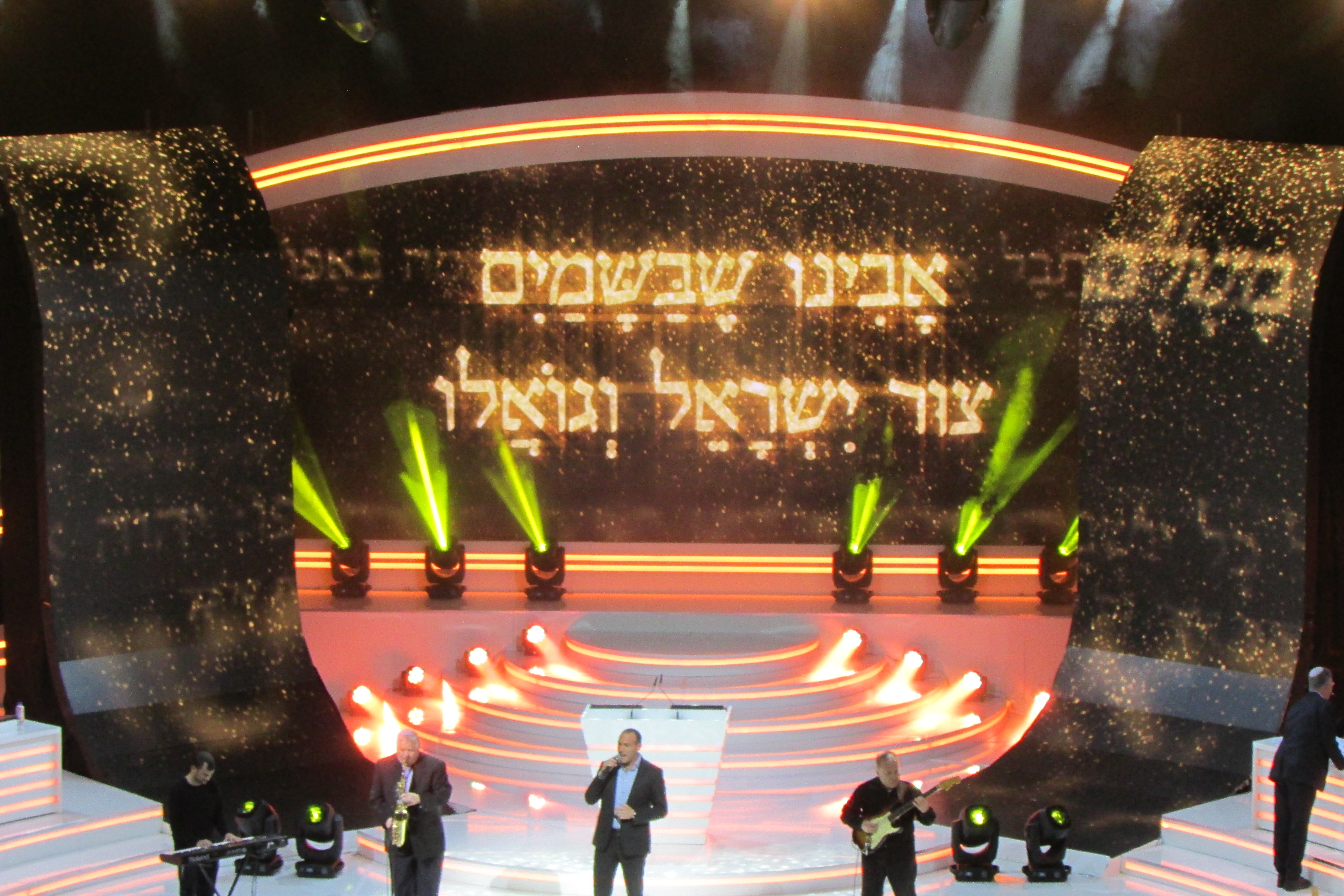 Bible quiz December 2017